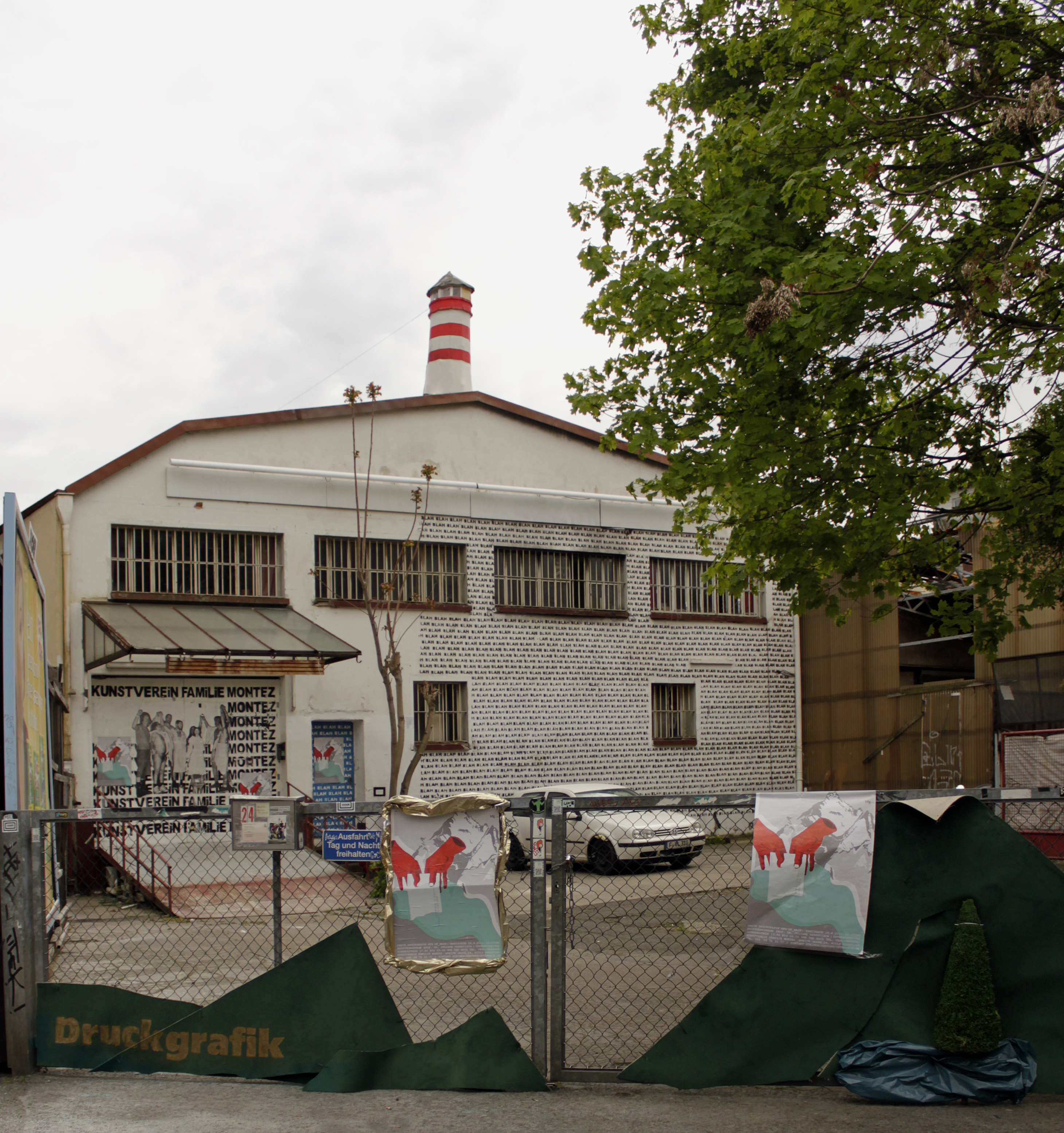 Kunstverein Familie Montez, Frankfurt/Main im April 2012